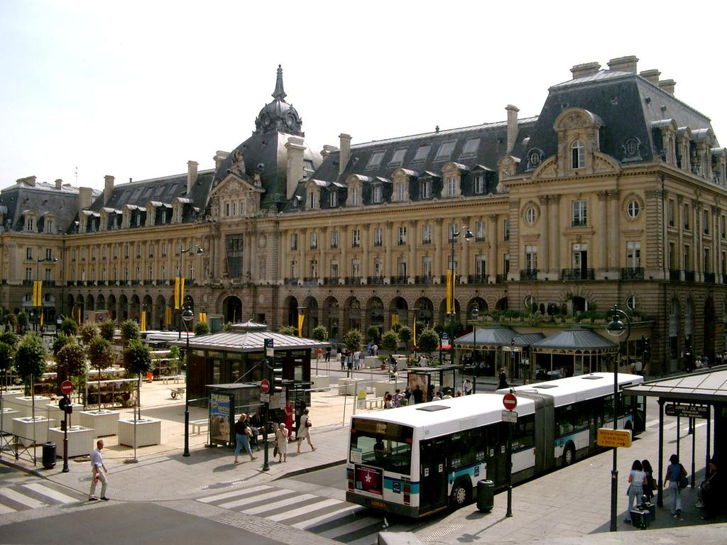 Le Palais du Commerce est le site d'un bureau de poste d'une agence de France Telecom Orange. Il est situé à Rennes.